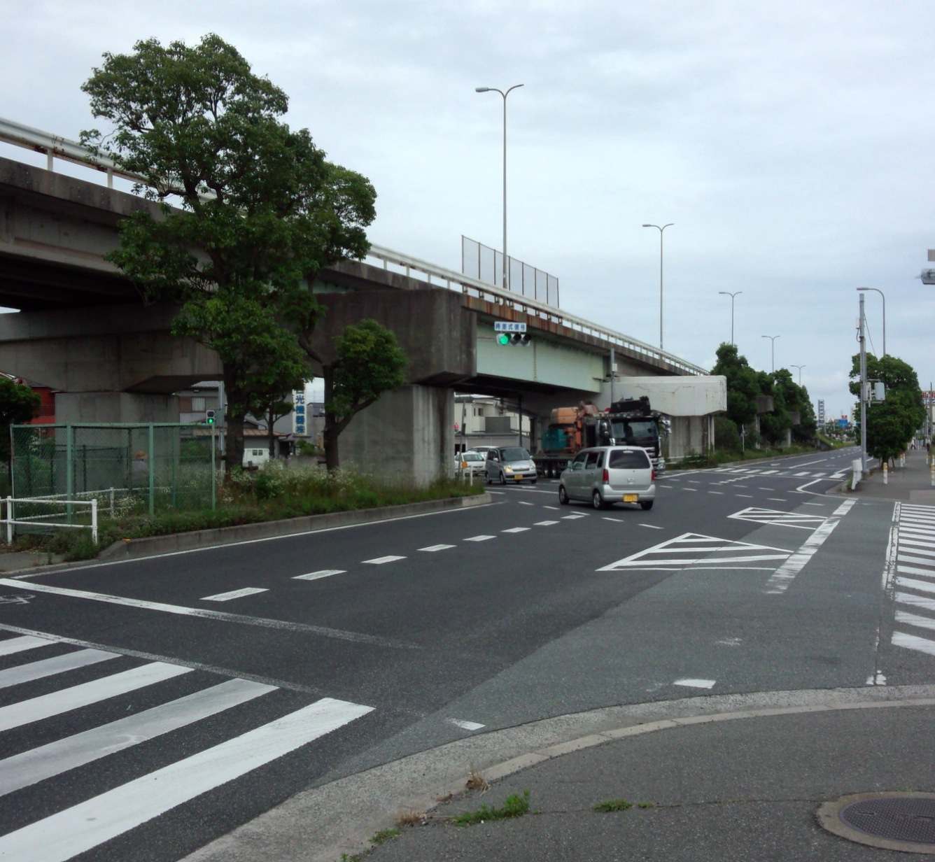 別府鉄道の中野駅跡